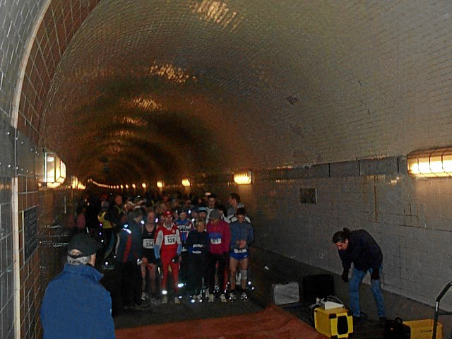 Alter Elbtunnel Marathon. This is a photograph of an architectural monument.